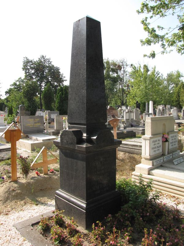 Török Flóris (Tapolva, 1825 - Ertsébetfalva, 1878) 1867 előtt rendőr-alkapitány Pesten. Erzsébetfalva egyik alapítója és helyettes bírája, az iskolaalapítás kezdeményezőjének sírja. Pestszenterzsébeti temető: 2-1-1-1/2.